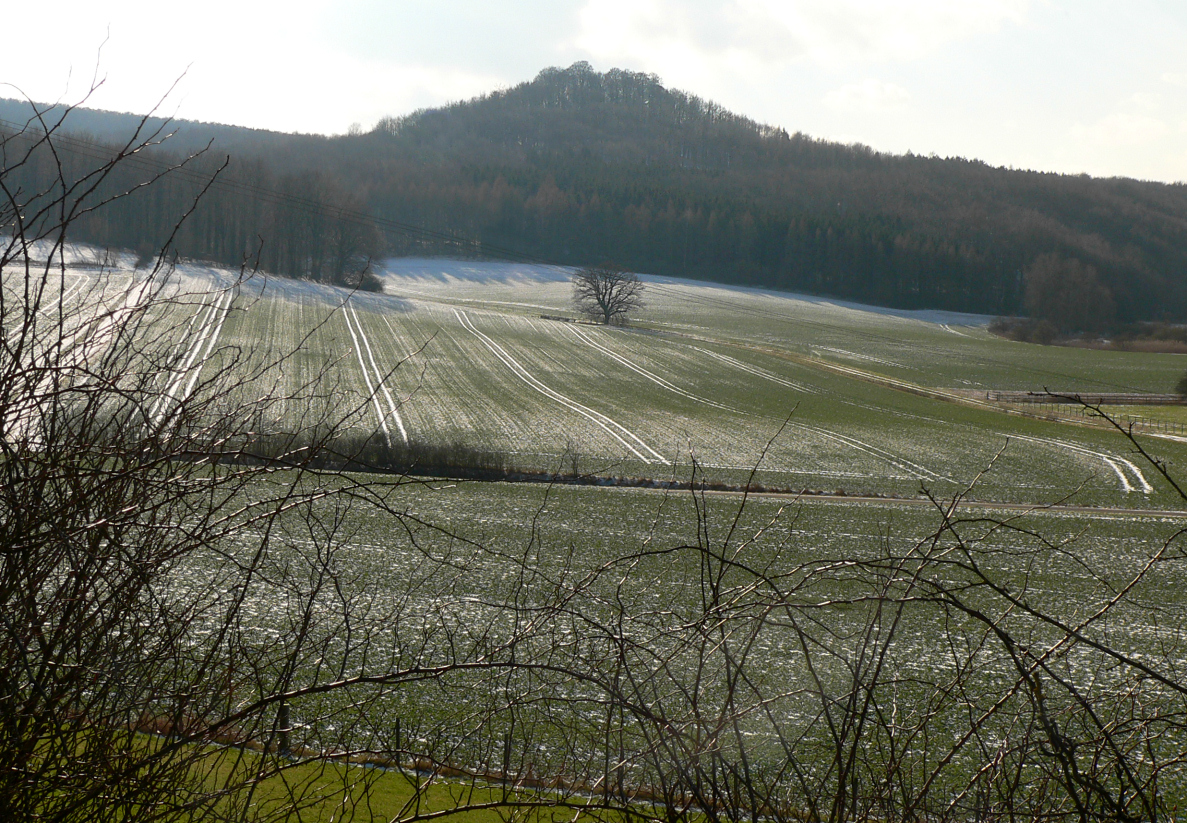 Lichtenstein